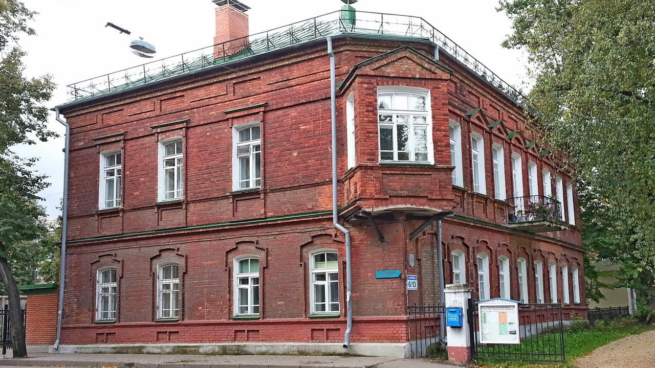 Беларуская (тарашкевіца): Забудова вул. Камсамольскай This is a photo of Belarusian heritage monument. Reference number: 213Г000034 ( WLM)